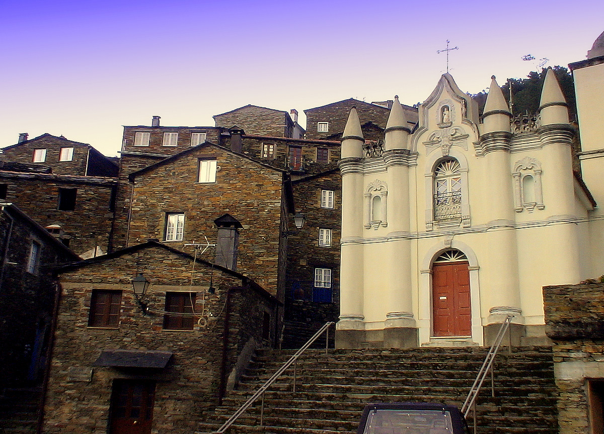 Aldeia de Piodão